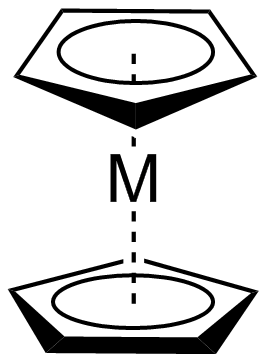 Metalloceen